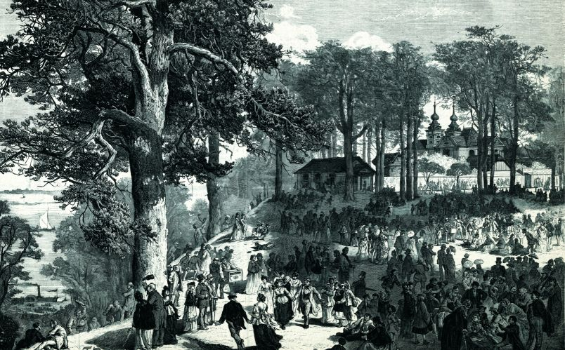 М. Андриолли. Зелёные святки (Троица). Беляны под Варшавой.